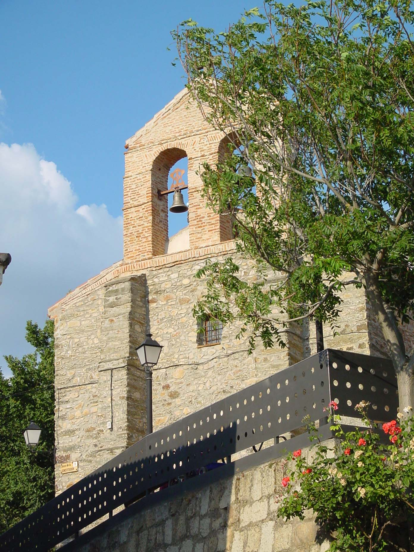 Iglesia de Berzosa del Lozoya.